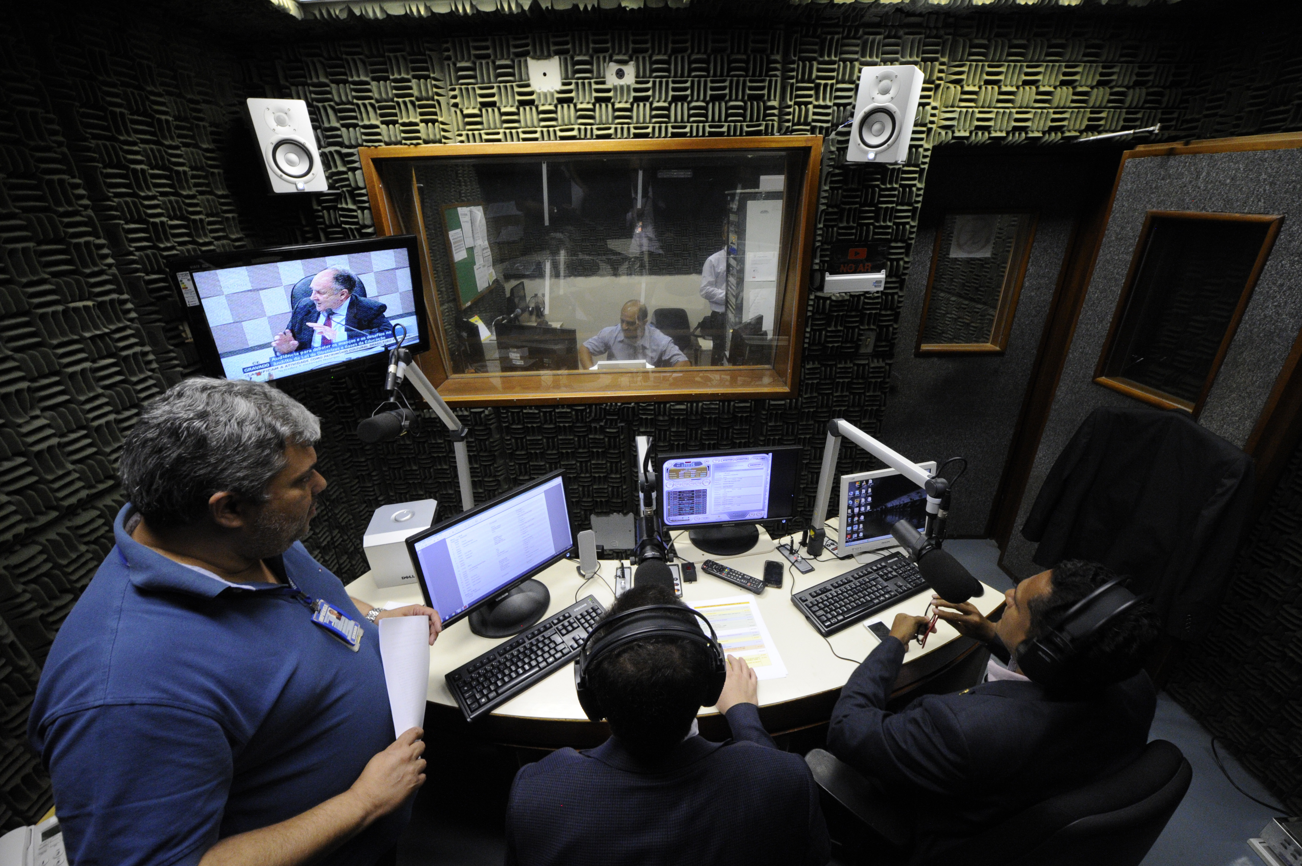 Fotos para exposição dos 20 anos da Rádio Senado.Foto: Edilson Rodrigues/Agência Senado